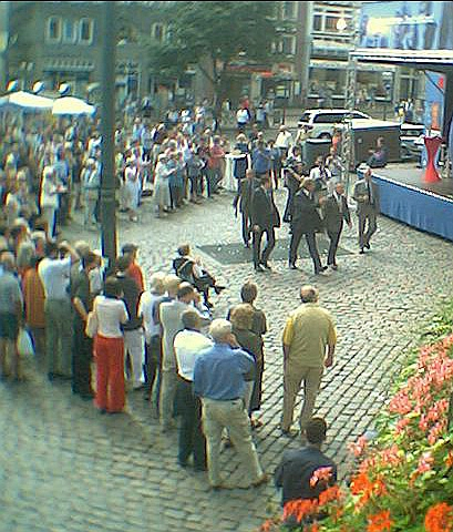 SPD-Wahlkampf auf dem Südermarkt, Flensburg mit Hans Eichel und Wolfgang Wodarg im Jahr 2002 (Bild 3) - Der Eichel kommt mit dem Wodarg